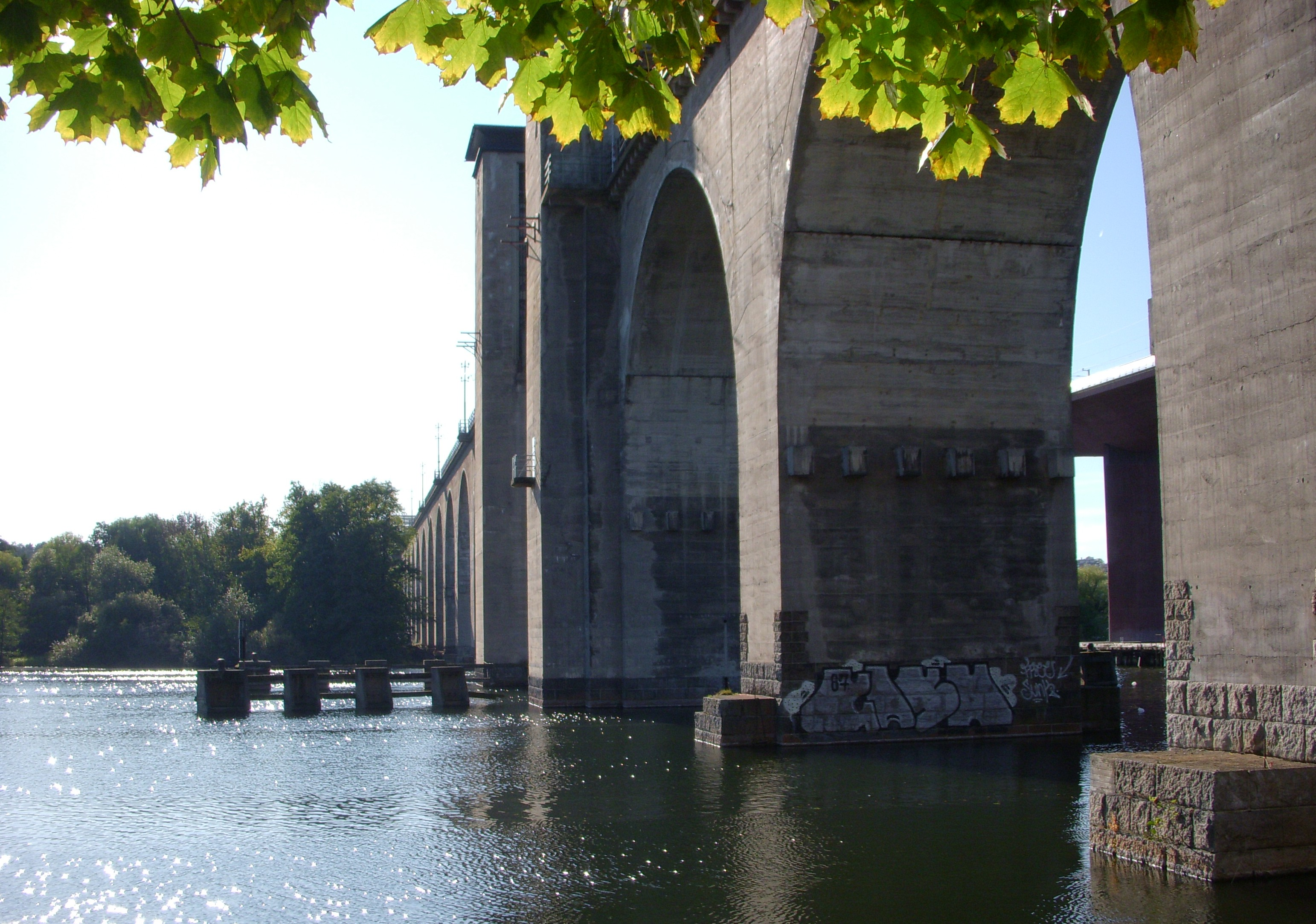 Östra (gamla) Årstabron, Stockholm, vy från norr